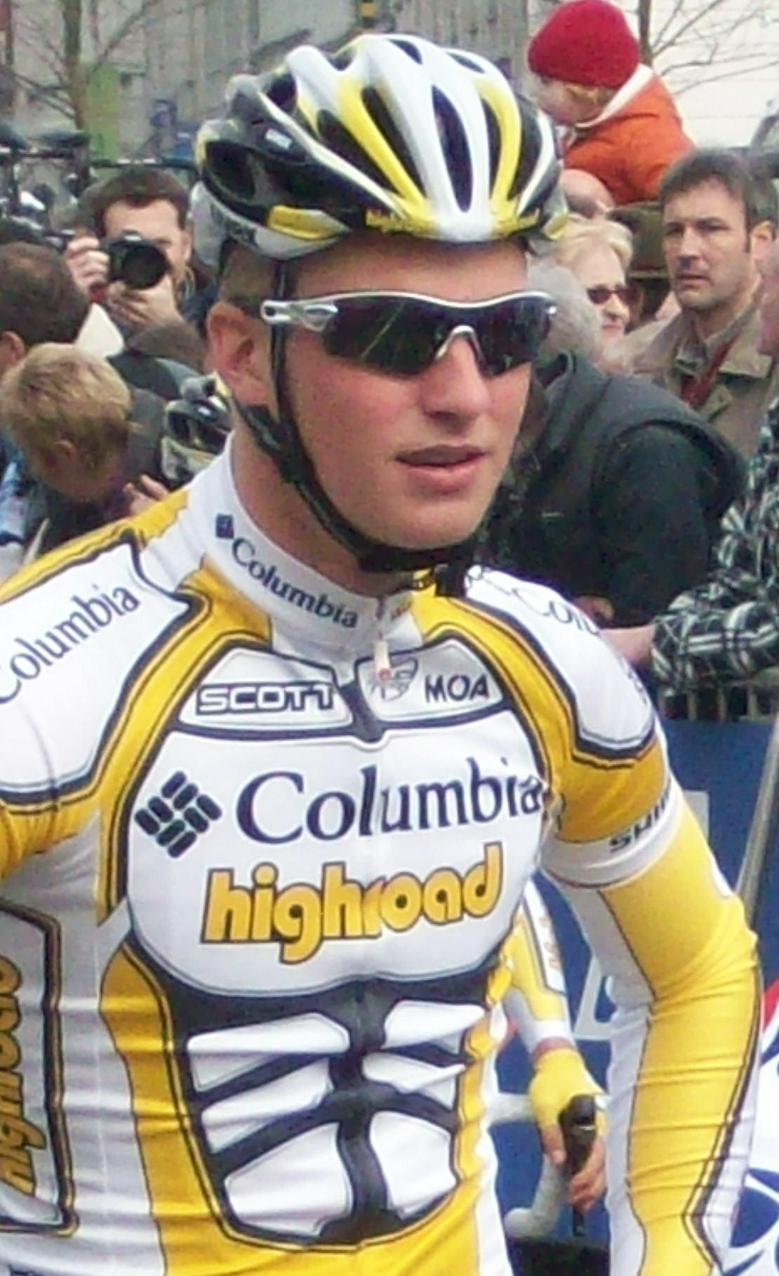 Gert Dockx, au Circuit Het Nieuwsblad 2009